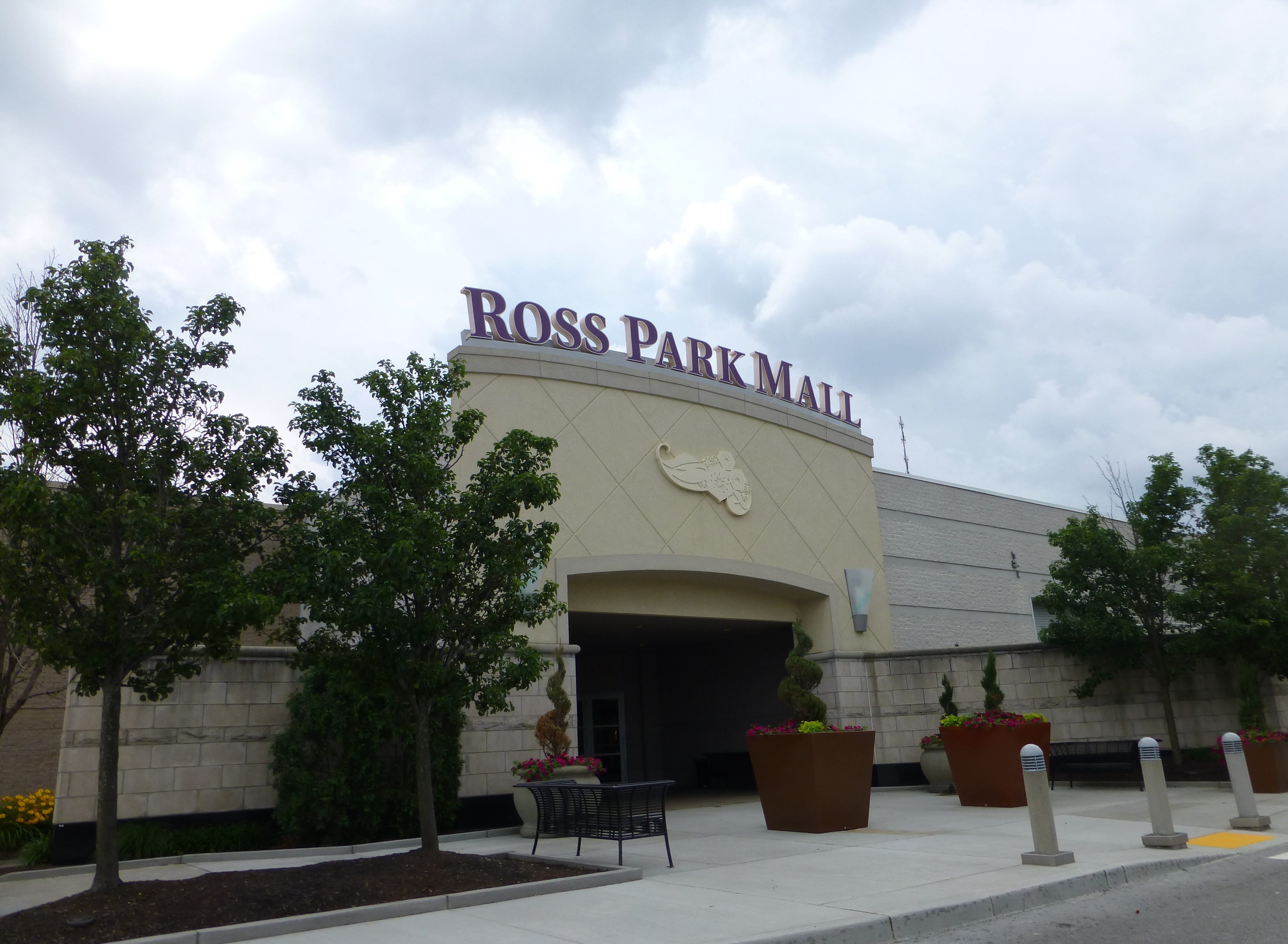 Mall Entrance